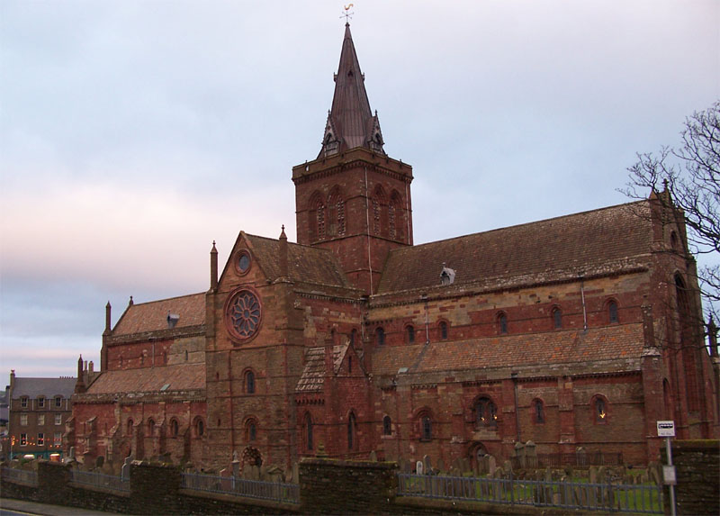 St. Magnus Cathedral, Kirkwall (Orkney)